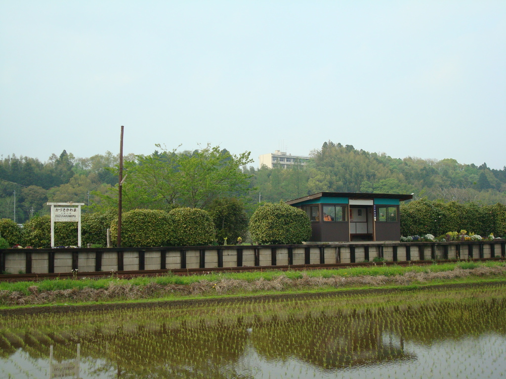 Kazusa-Kawama Station on the Kominato Line, Ichihara, Chiba, Japan